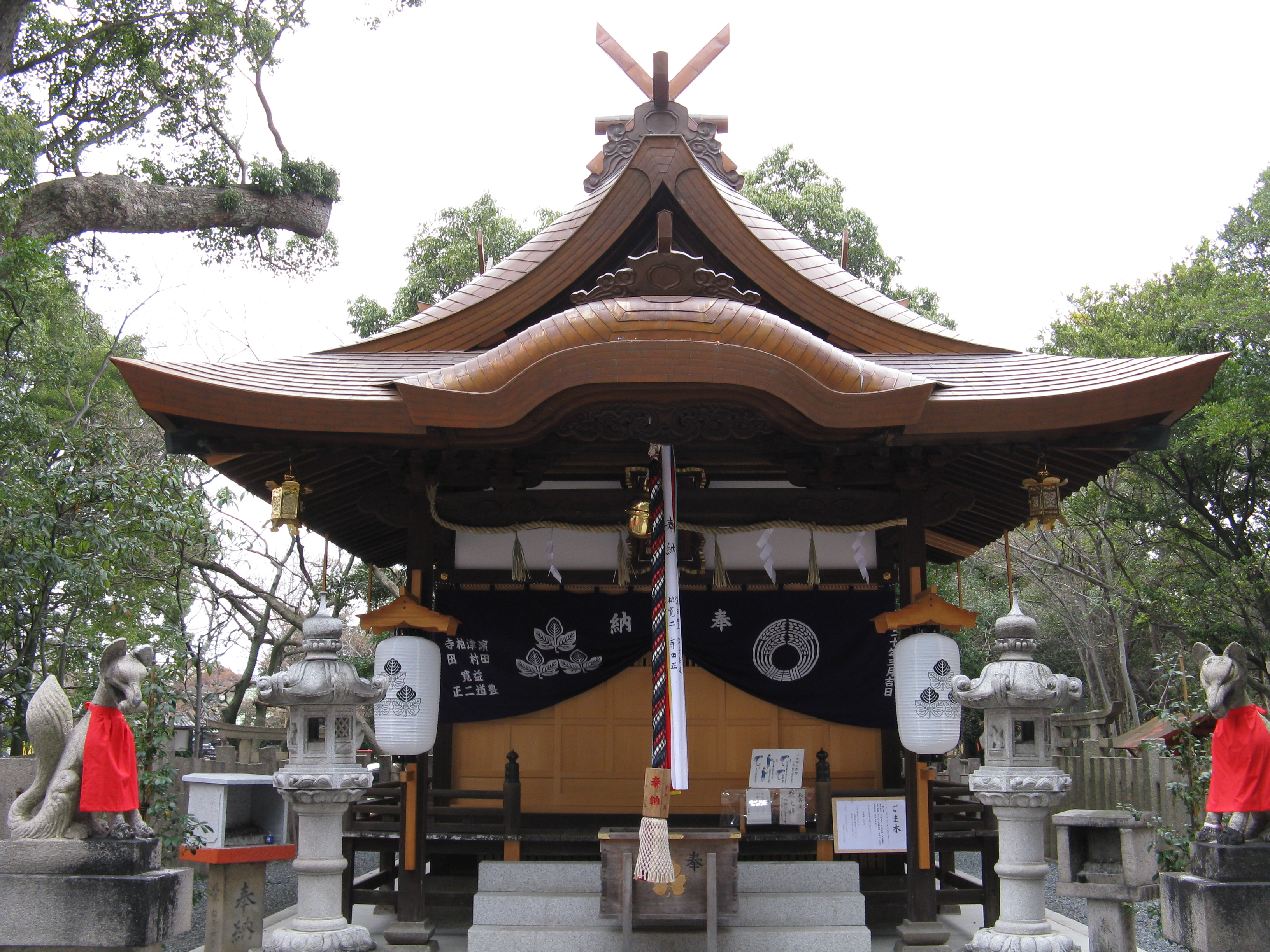 信太森葛葉稲荷神社 拝殿